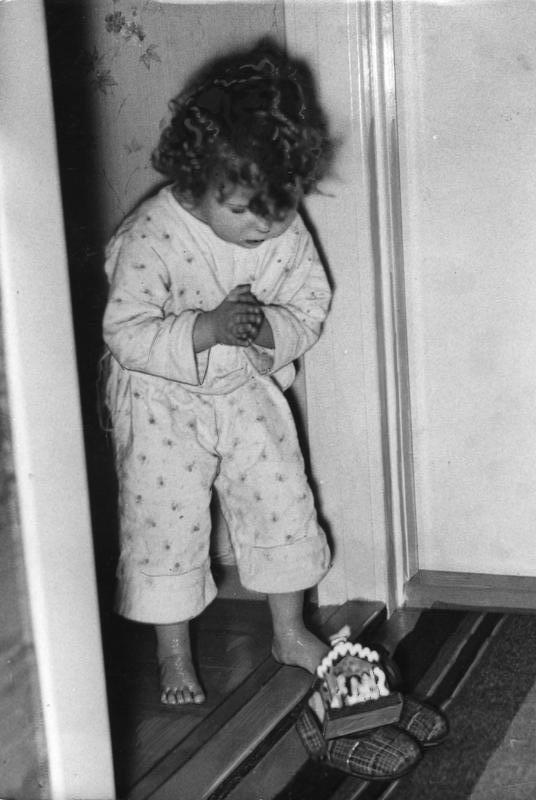 Nikolausgeschenk Der Nikolaus ist da! (Scherl-Bilderdienst) [Kind im Schlafanzug beim Finden des Nikolausgeschenkes]